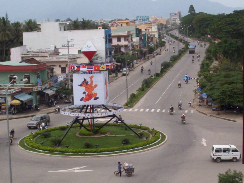 Giao thông trên quận Thanh Khê. Hình được chụp vào năm 2012, trên sân thượng của một tòa nhà tại Quận Thanh Khê